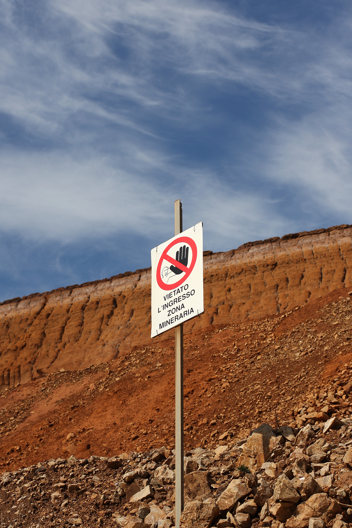 Iglesias (CI)